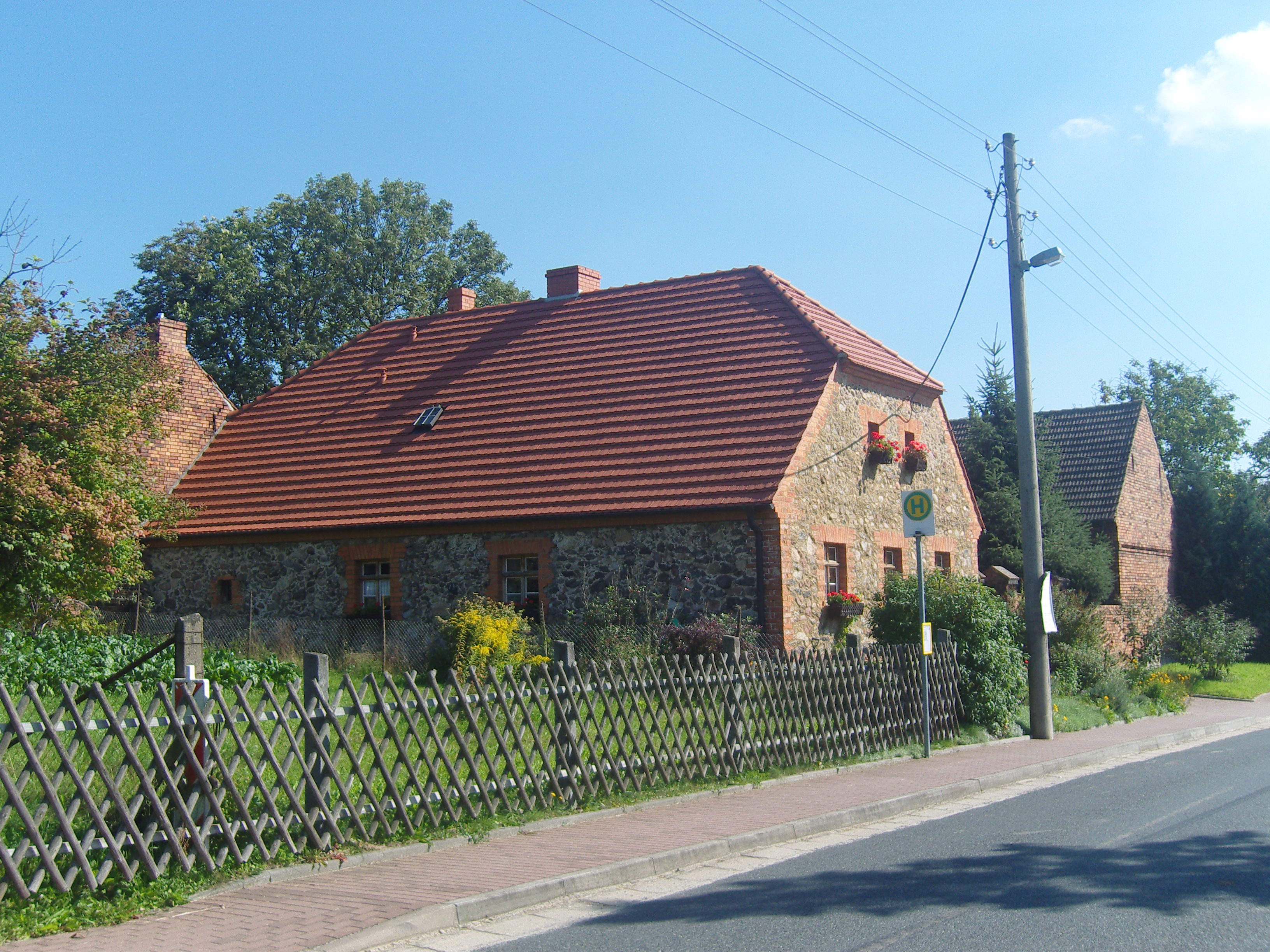 Weißag in der Gemeinde Luckaitztal